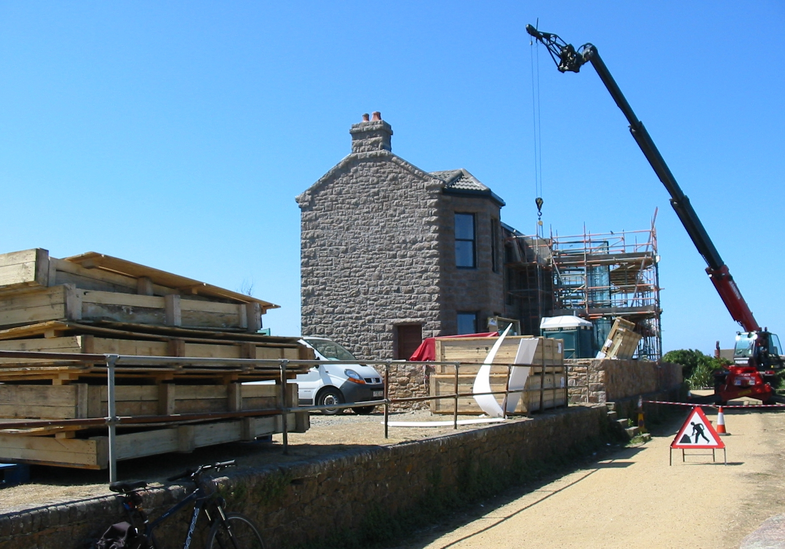 Nrf: Saint Hélyi, Jèrri